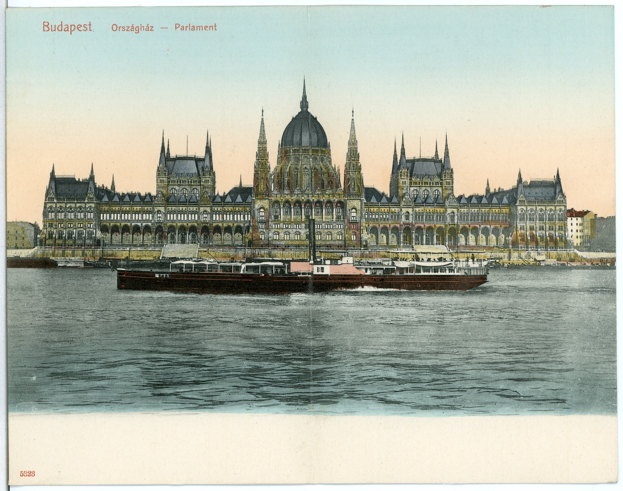 Budapest; Parlament mit Donau und Dampfschiff This postcard is from publisher Brück & Sohn in Meißen ( This postcard has a unique number 05323 and is available in a higher resolution at the publisher. This images was uploaded in a cooperation project between Wikipedians and the publisher.